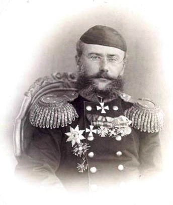 Абрамов, Александр Константинович